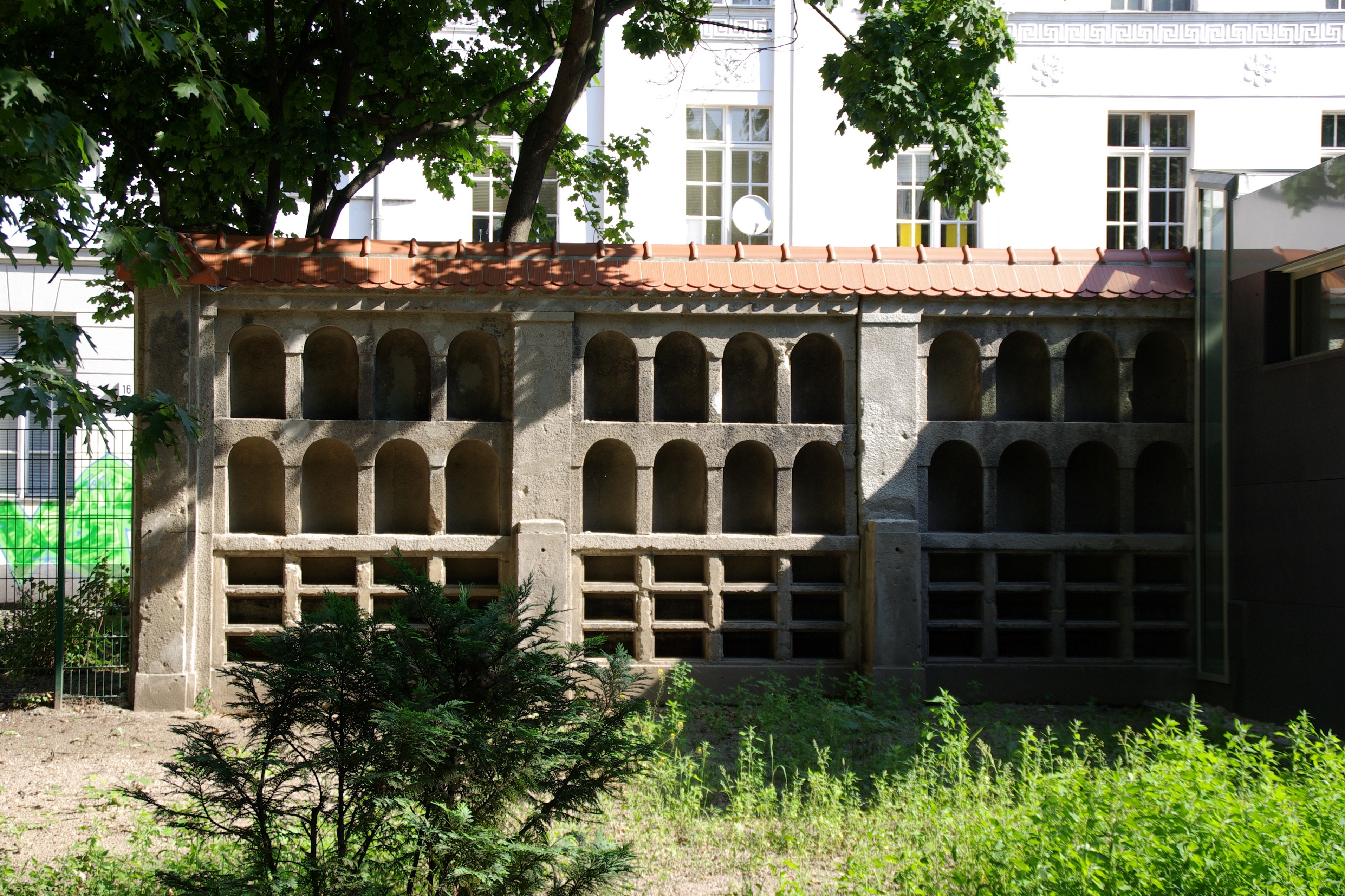 Berlin-Wedding. Der Urnenfriedhof in Berlin-Wedding steht unter Denkmalschutz.